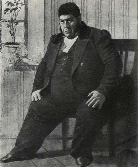 Константин Александрович Варламов в роли Яичницы, 1886, фотография